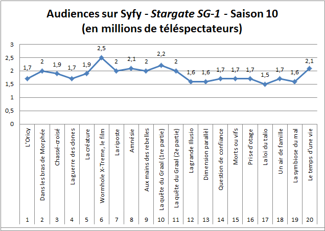 Courbe des audiences de la saison 10 de Stargate SG-1 aux États-Unis sur Syfy.